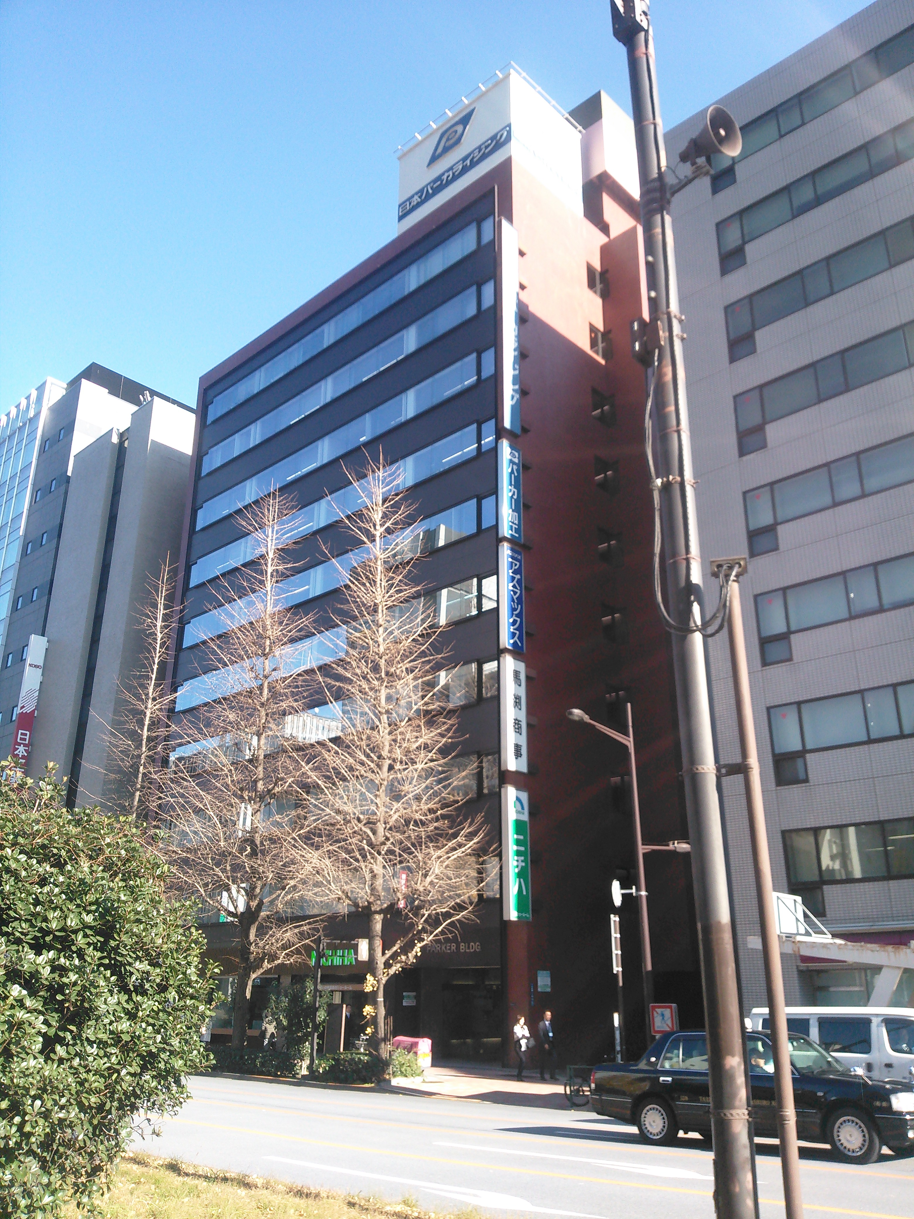 東京都中央区日本橋、日本パーカライジング本社ビル